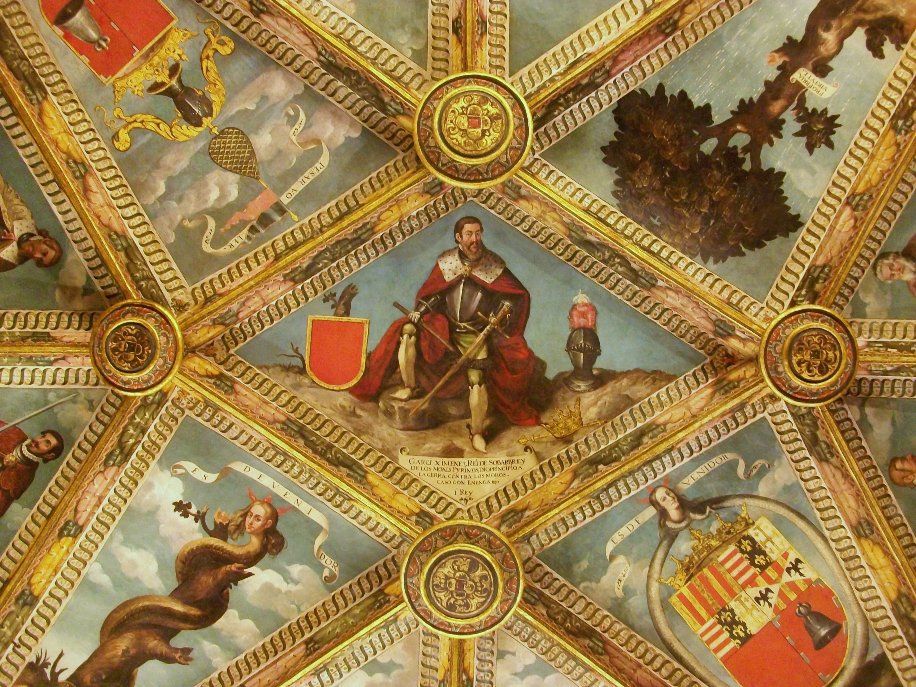 Sala Daurada del palau comtal de Cocentaina. Al sostre apareixen representats els Reis de Navarra dels quals es pensaven descendents els Corella, senyors de Cocentaina.